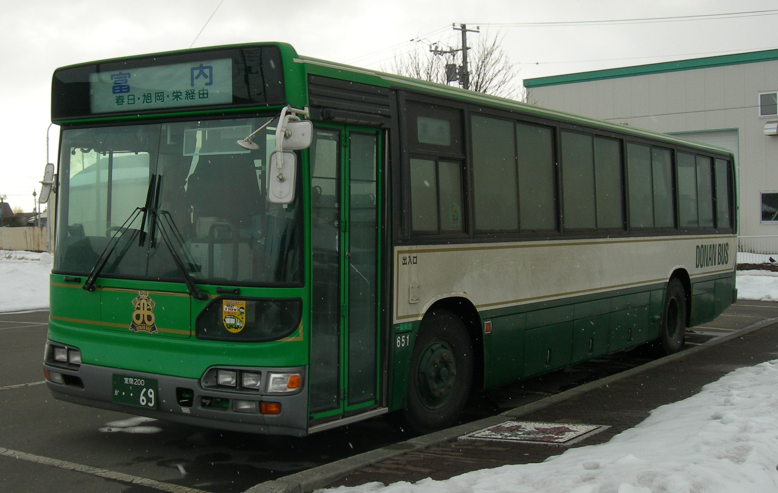 Dōnan Bus car 道南バス 路線バス